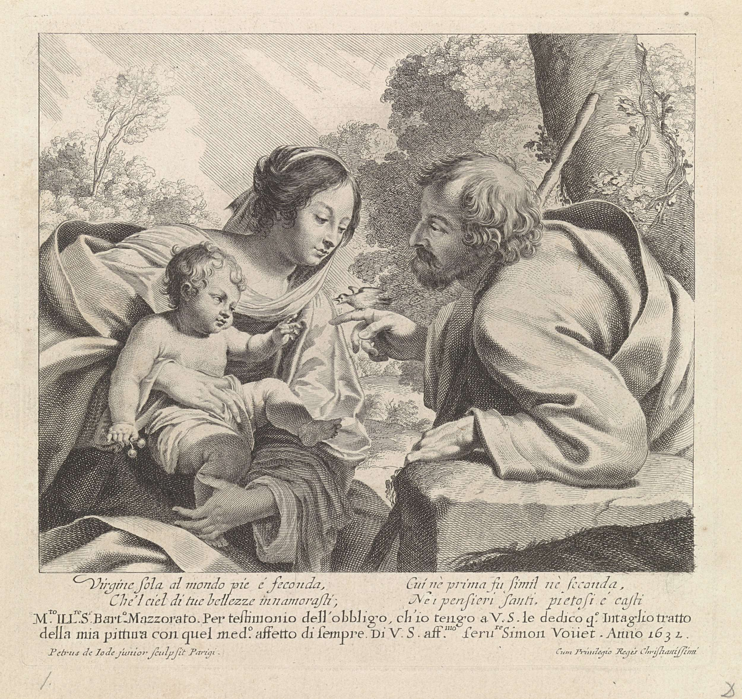 Links zit Maria, met het Christuskind op schoot. Rechts staat Jozef, met een staf, leunend op een steen. Op zijn rechterhand zit een vogel, die hij het Christuskind aanbiedt. In de marge een onderschrift in het Italiaans.; Iconclasscode: 73B81; Iconclasscode: 25F3; print